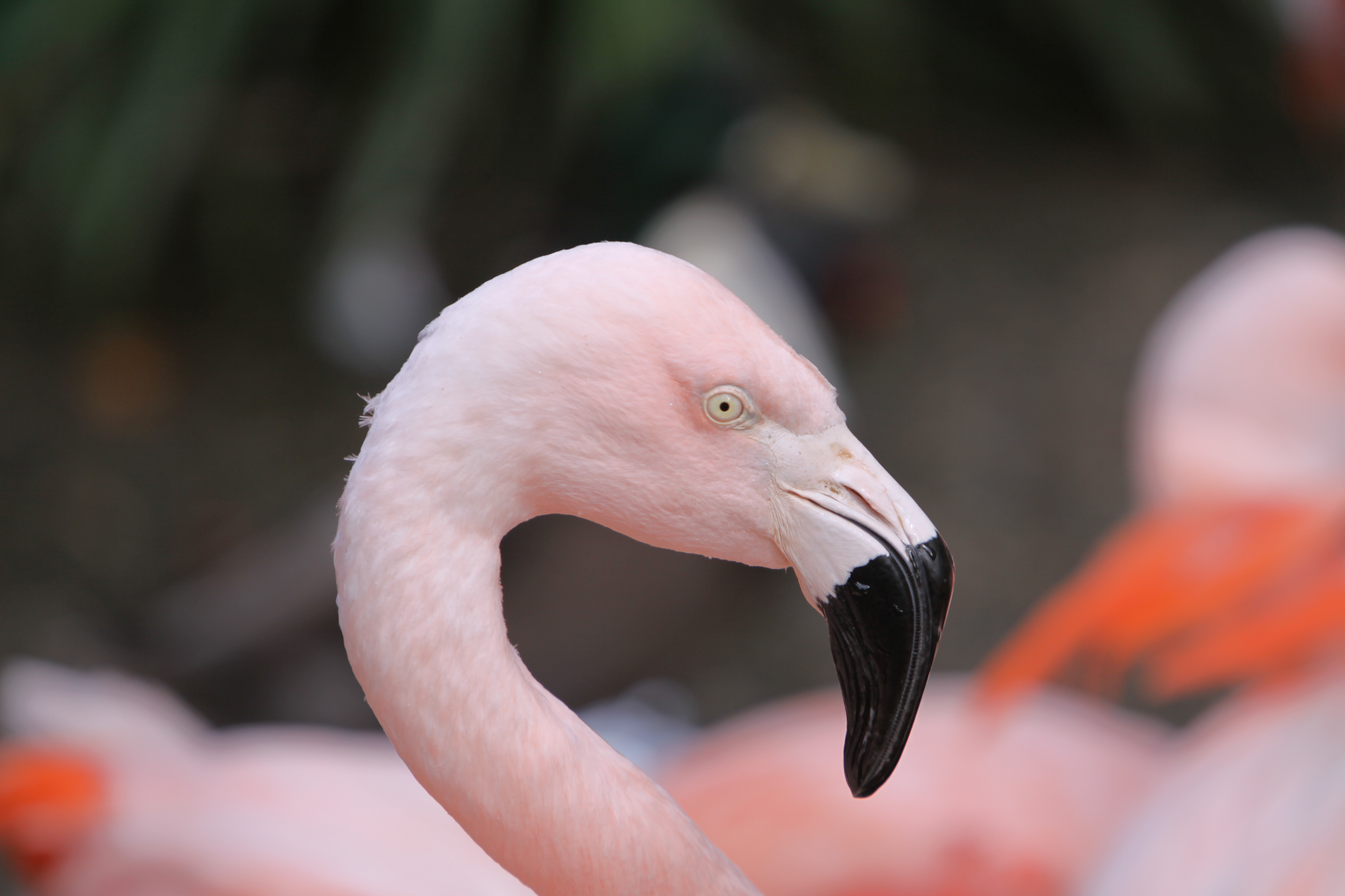 Chileflamingo (Phoenicopterus chilensis) im Durrell Wikdlife Park